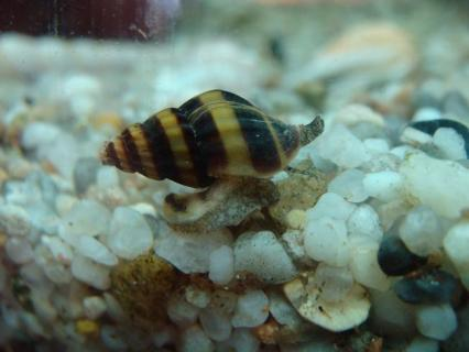 Caracol asesino